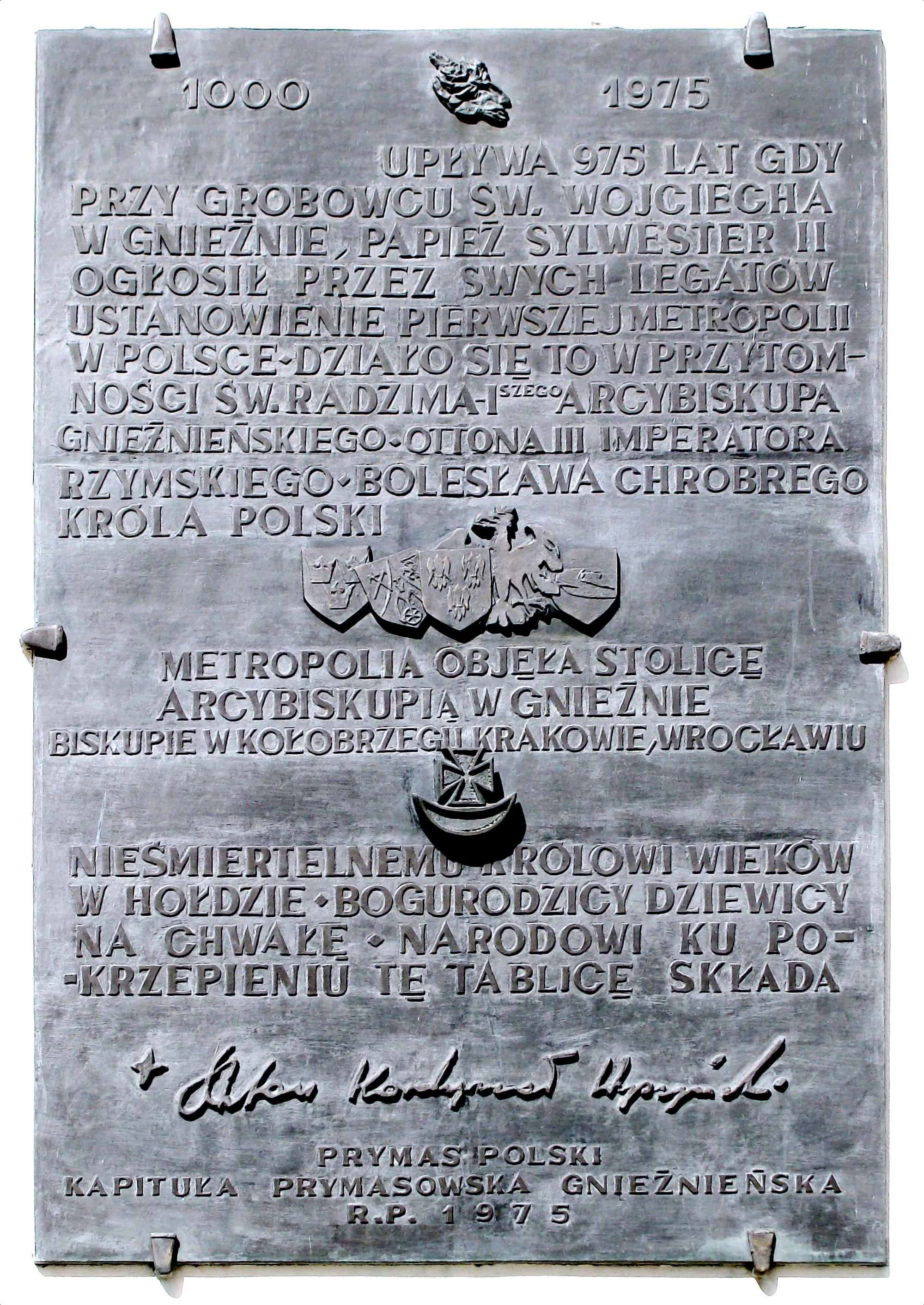 Tablica pamiątkowa ufundowana przez Wyszyńskiego dla upamiętnienia daty utworzenia biskupstw polskich, katedra w Gnieźnie